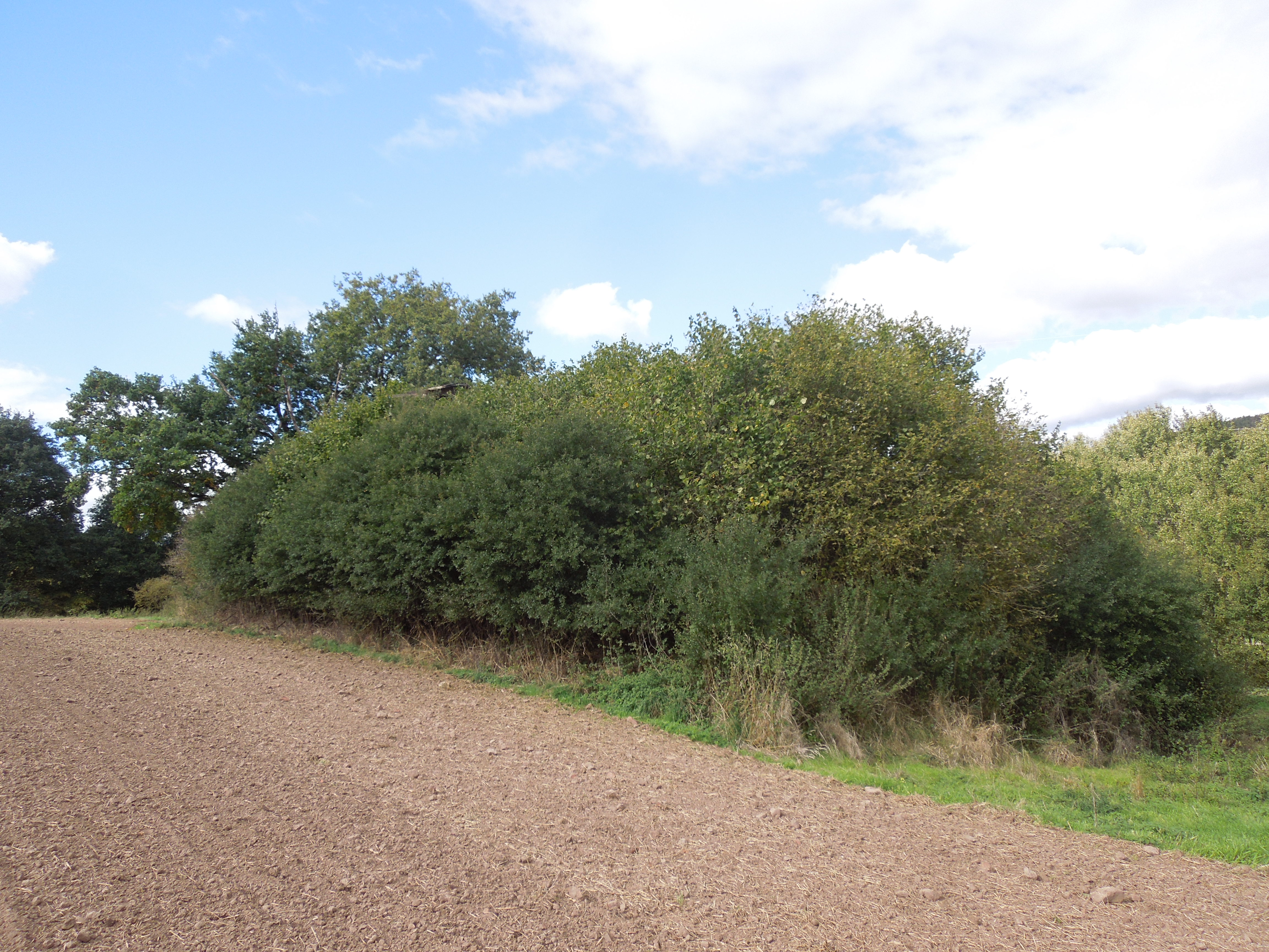 Die Busch- und Gehölzgruppe um die Reste der Margarethenkirche bei Kerstenhausen, Anblick von Südosten